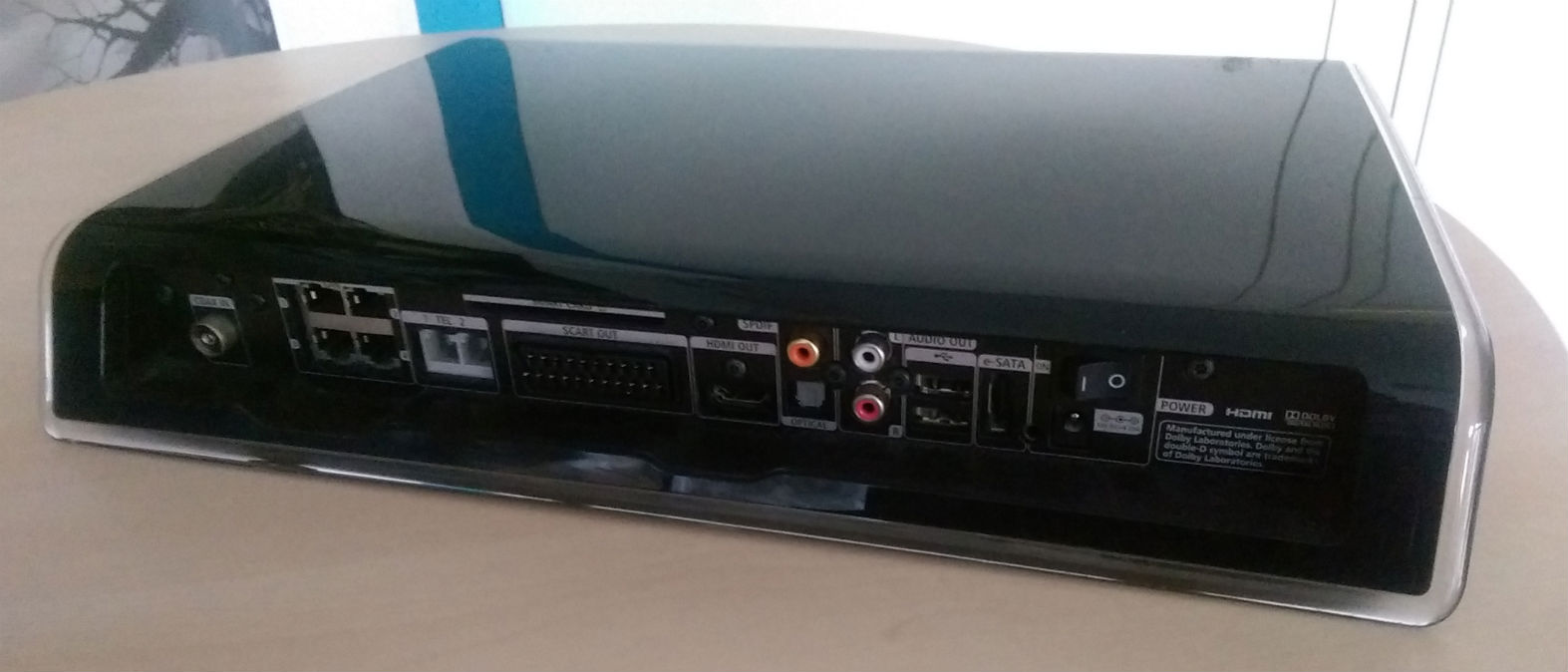 Rückseite des Horizon HD Recorder von Unitymedia mit Anschlüssen